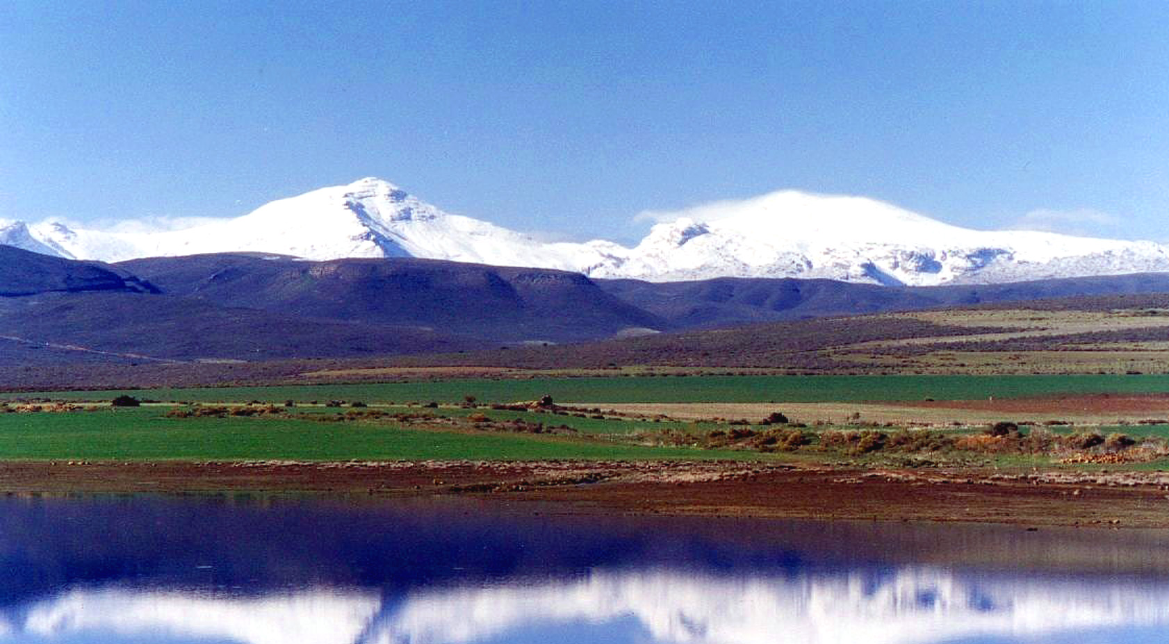 Matroosberg, die hoogste piek van die Hexrivierberg aan die suidoostekant van die Ceresvallei.